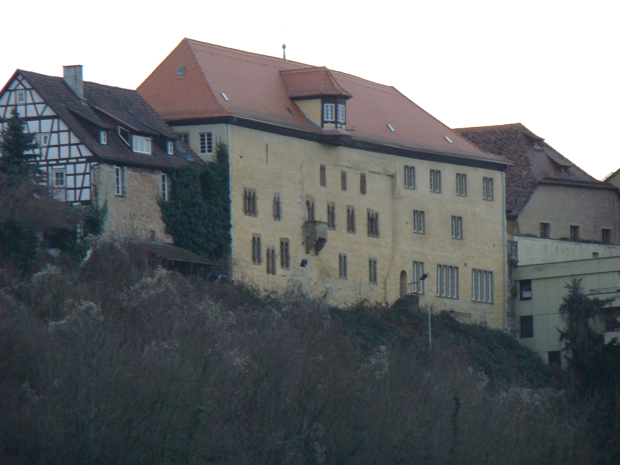 Wormser Hof in Bad Wimpfen, rückwärtige Ansicht vom Neckarufer